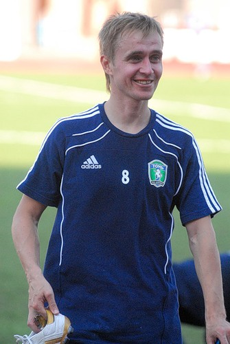 Киселёв, Денис Юрьевич